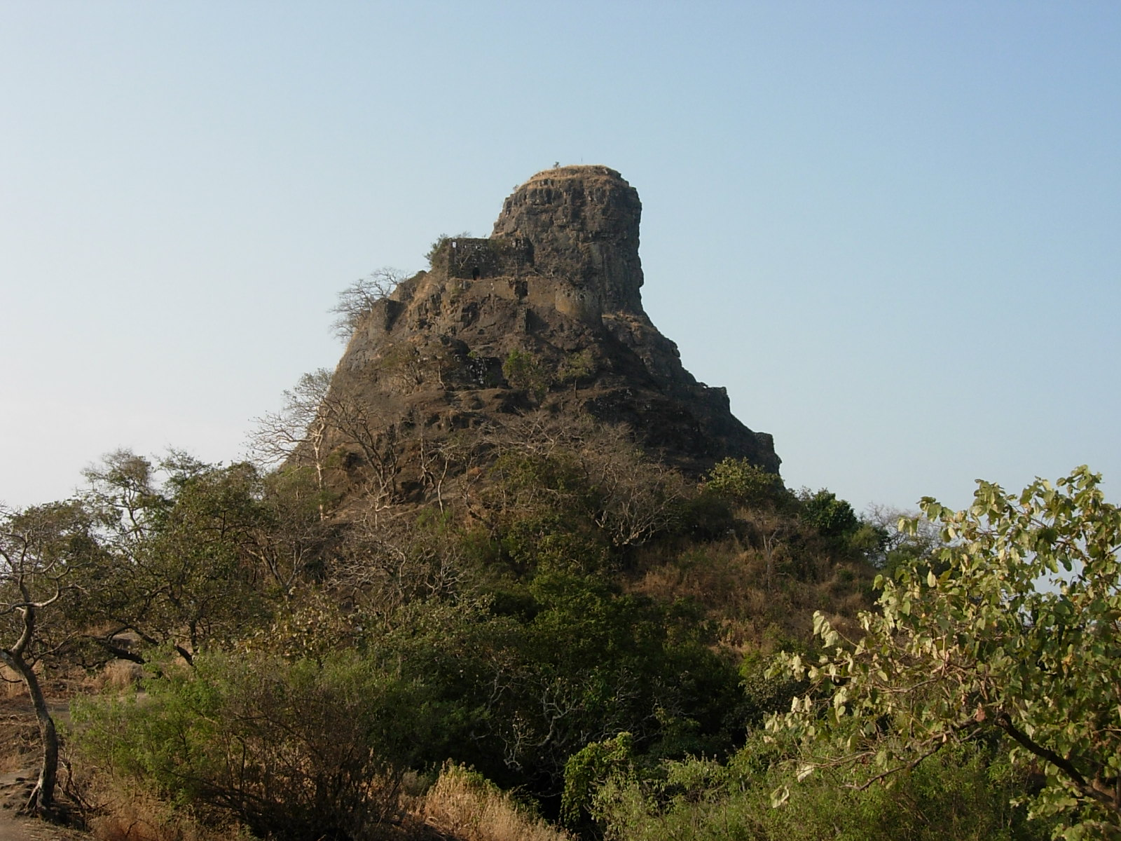 Karnala Fort